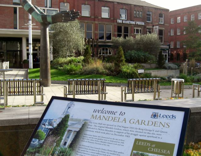 Entrée aux Jardins de Nelson Mandela et Sculpture de Kenneth Armitage "Both Arms" (à gauche)